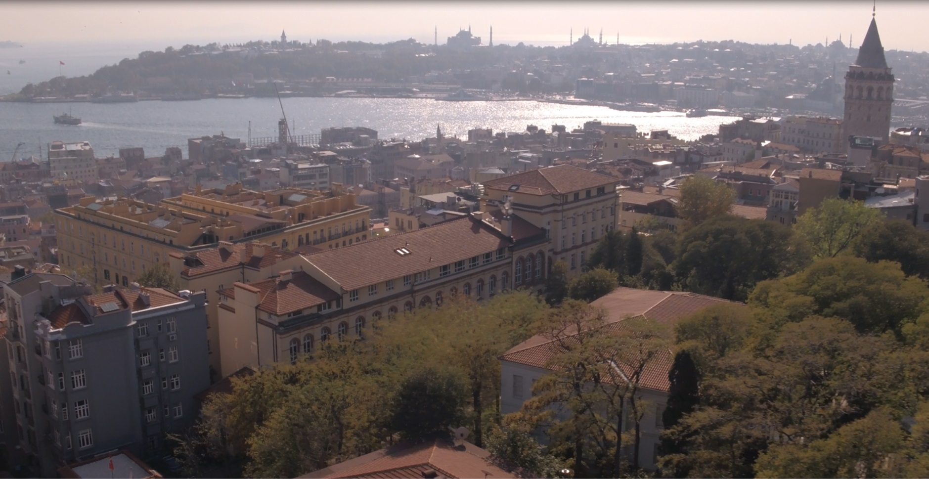 Özel Alman Lisesi'nin havadan görünümü.